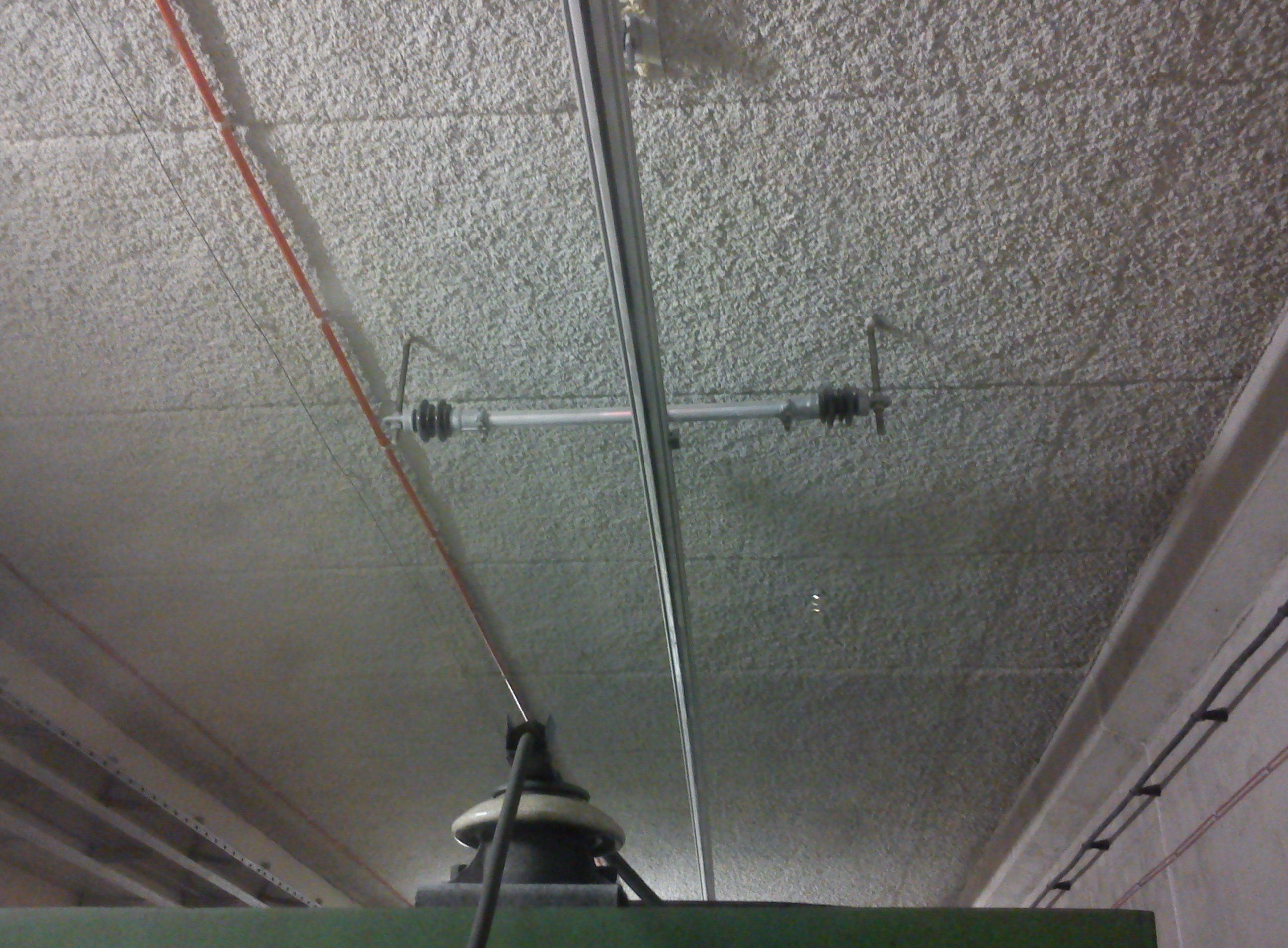 Sieć trakcyjna (sztywna) w tunelu tramwajowym na Franowo w Poznaniu.